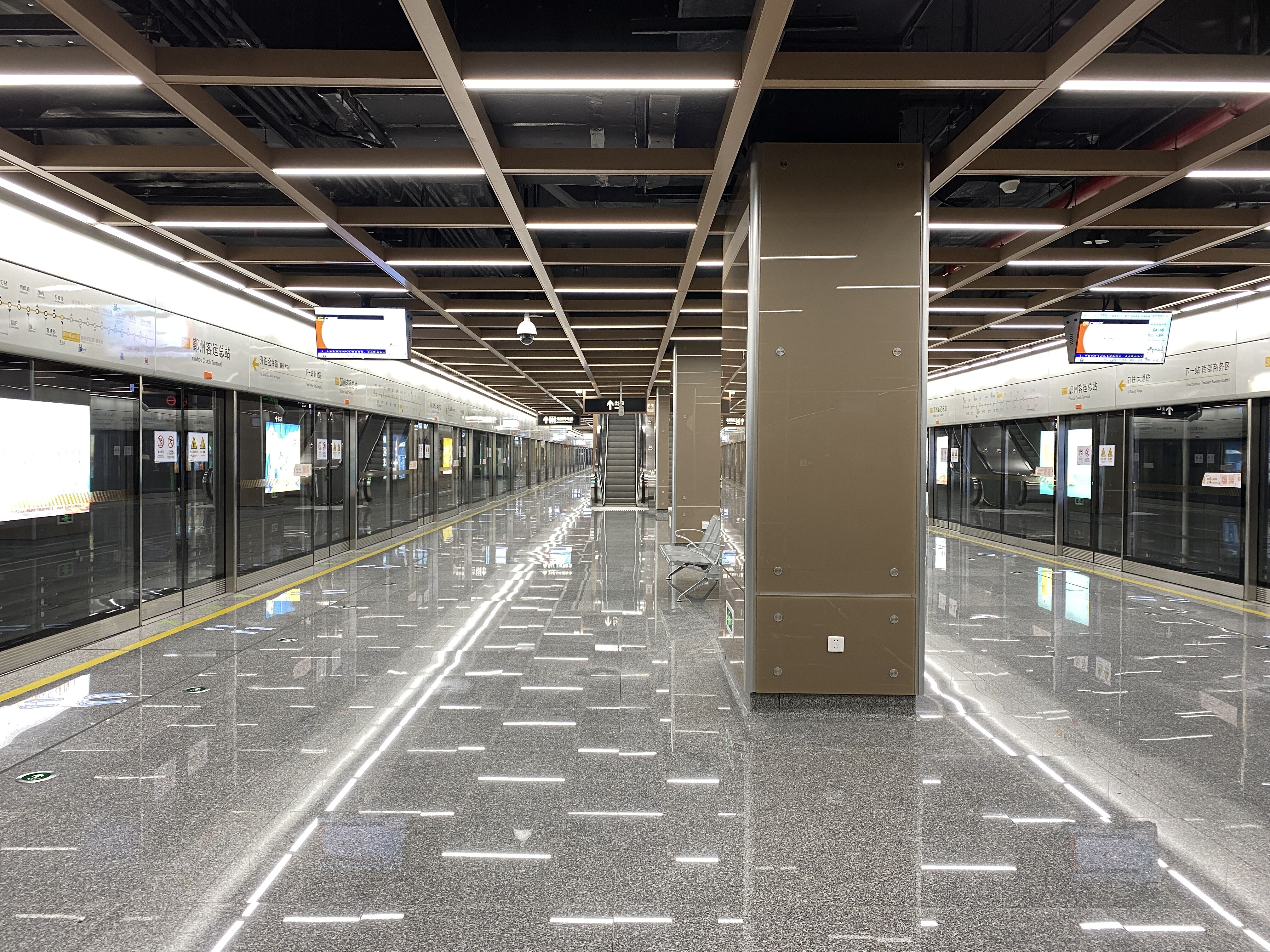 鄞州客运总站站站台